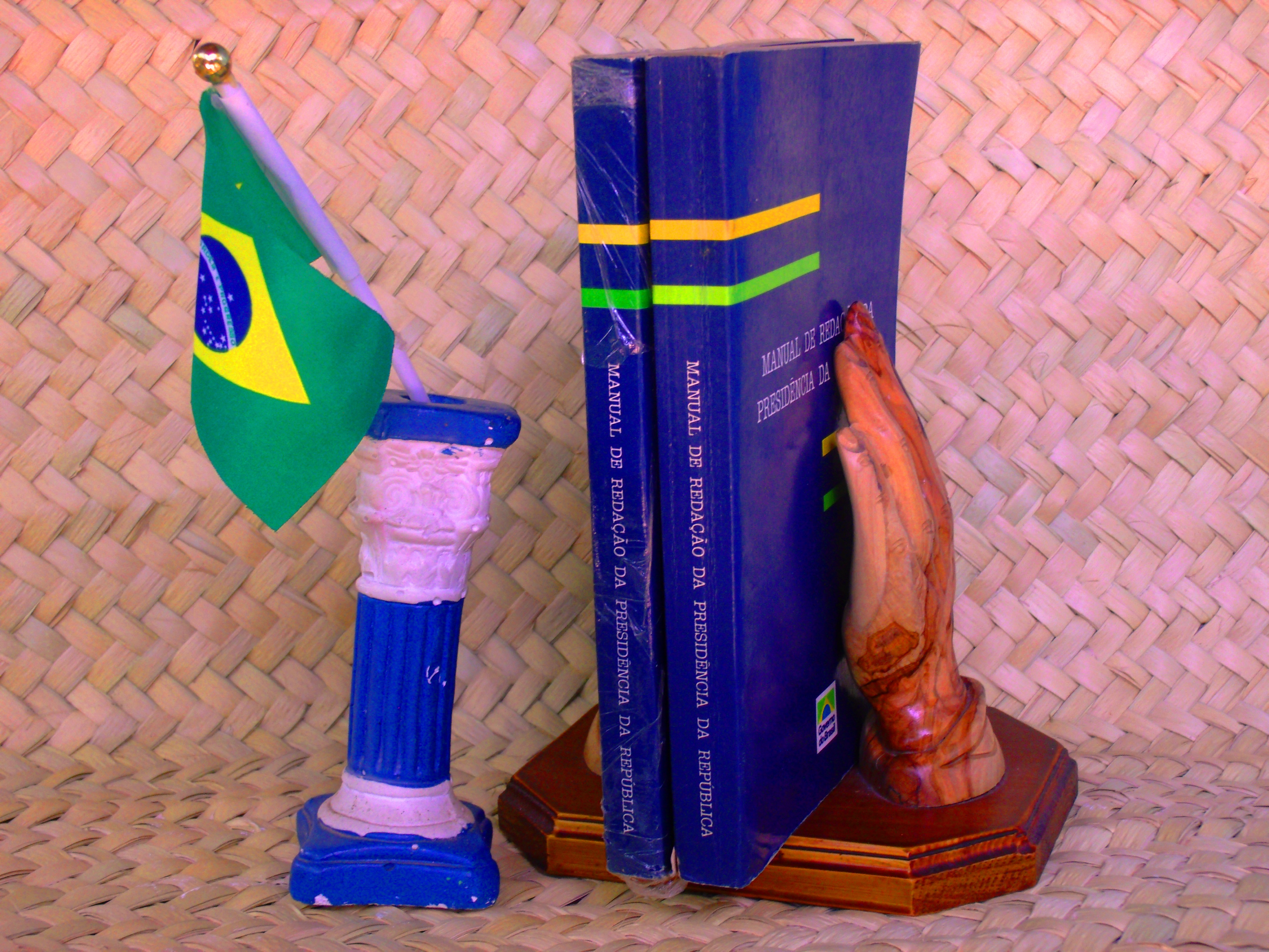 Expositor de artesanato com o Manual de Redação da Presidência da República do Brasil.